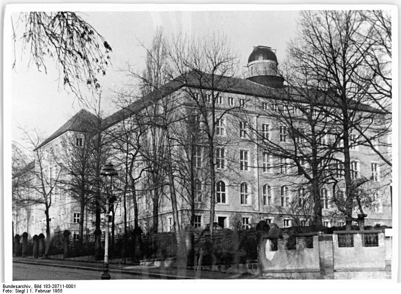 Bautzen, Sorbische Oberschule Zentralbild Siegl-Bautzen 2 Motive 1.2.1955 Sorbische Oberschule in Bautzen Für diesen modernsten sorbischen Schulneubau stellte die Regierung der DDR 3,5 Millionen DM zur Verfügung. 360 Schüler werden in 12 Klassen unterrichtet. 200 Schüler sind in einem der Oberschule angeschlossenen Schulinternat untergebracht. Im Südflügel dieser Oberschule ist eine Schulsternwarte untergebracht.